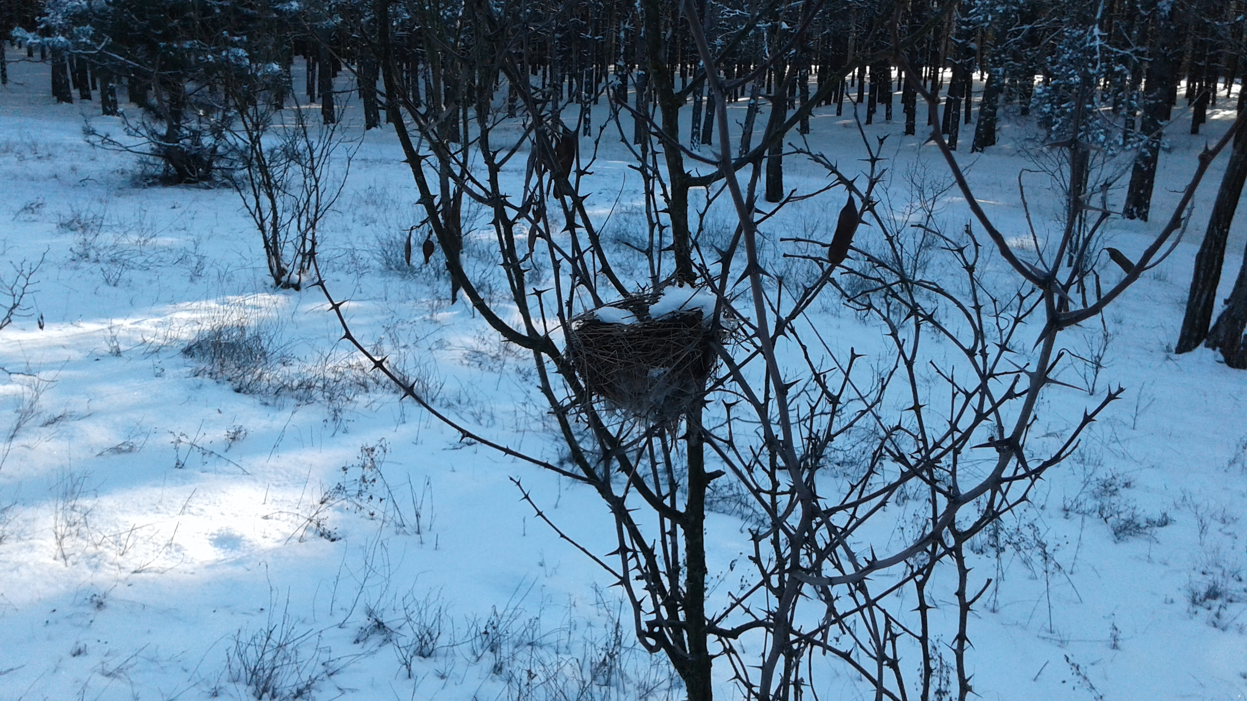 Баловно-Матвіївське урочище. Знято смартфоном.